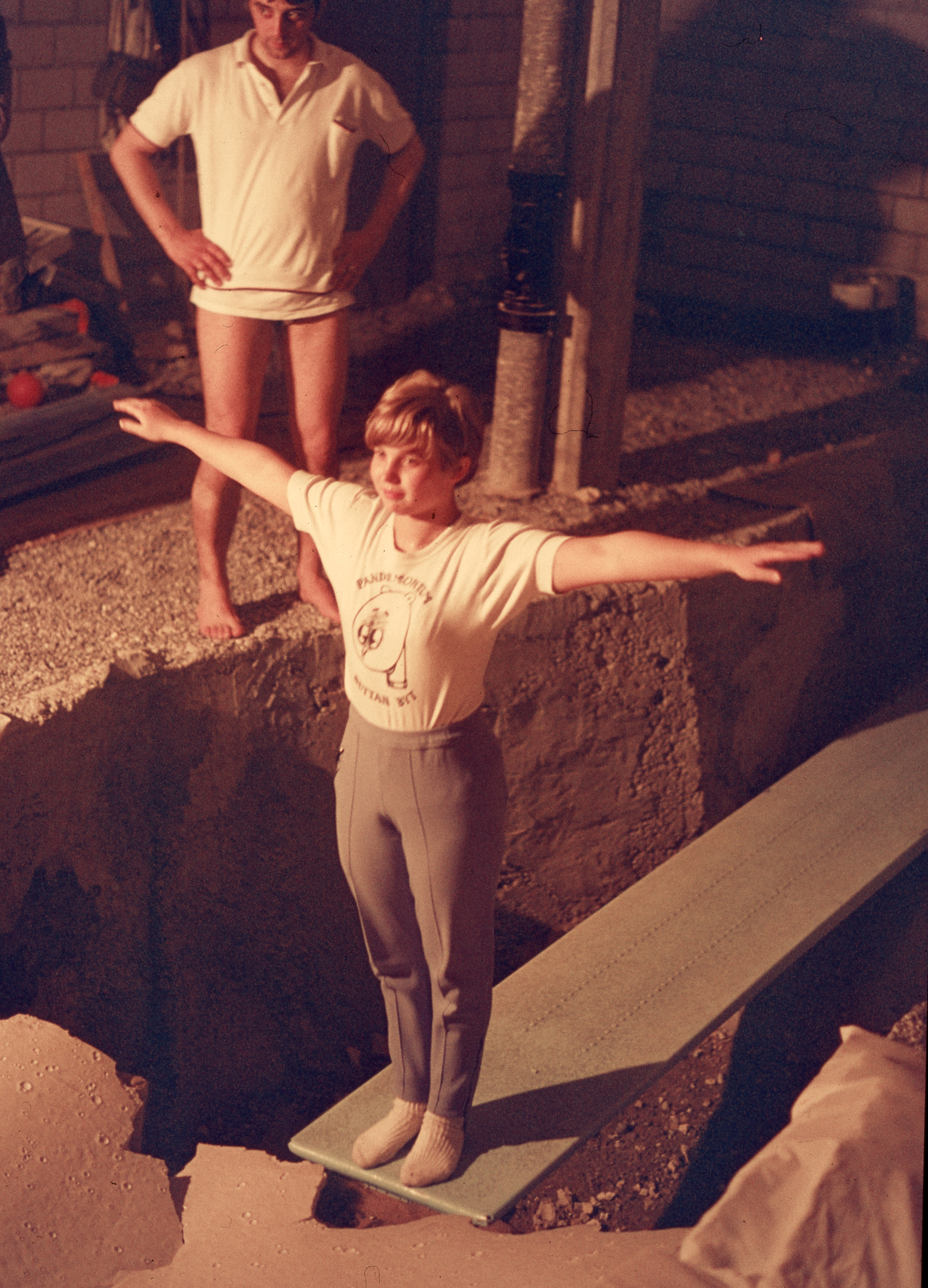 Olympiasiegerin Milena Duchkova beim Training in der Sprunggrube